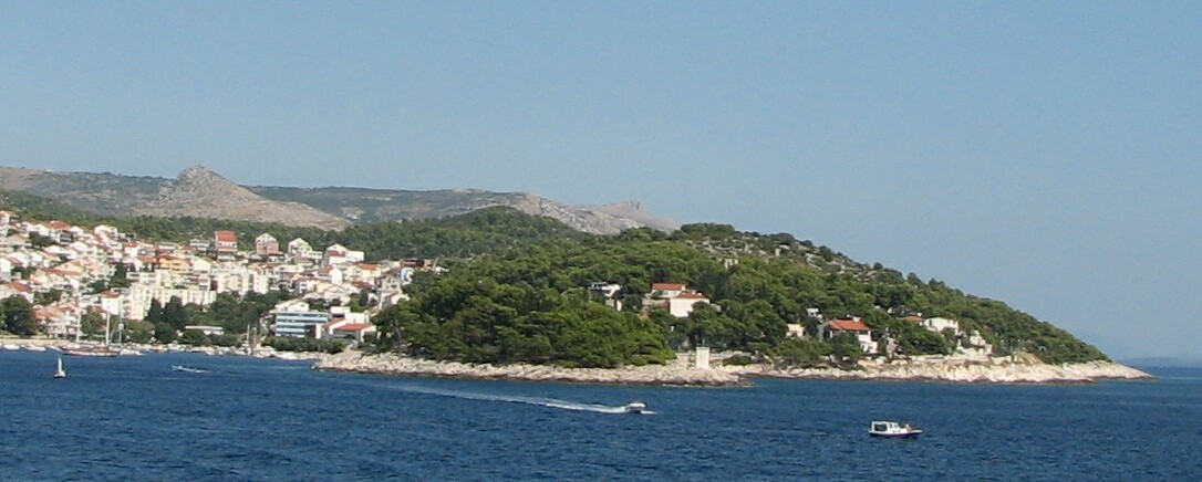 Galešnik (Gališnik), Hvar (back)